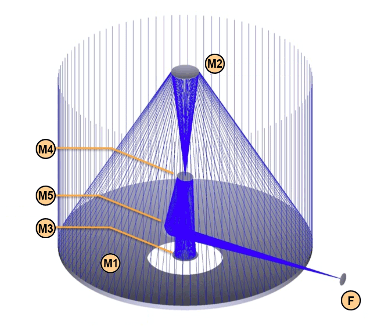 Chemin optique de l'E-ELT